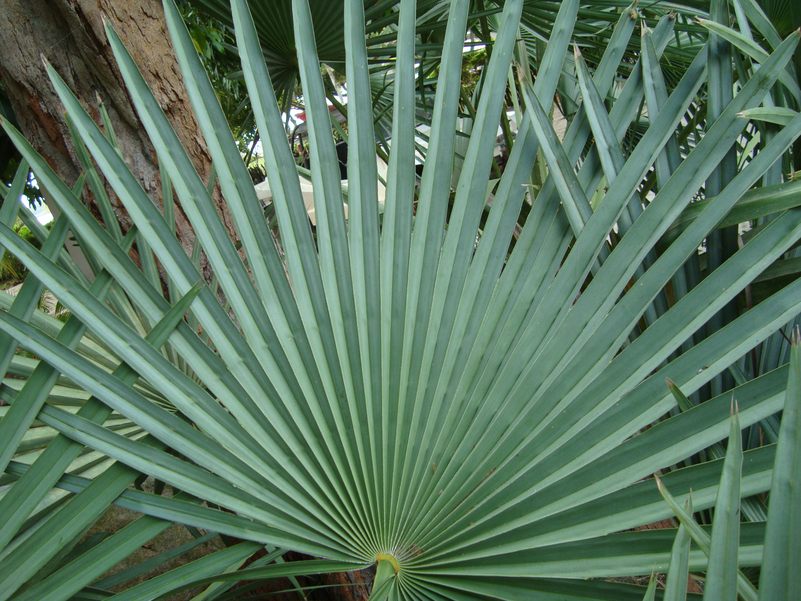 Palha da Carnaúbeira